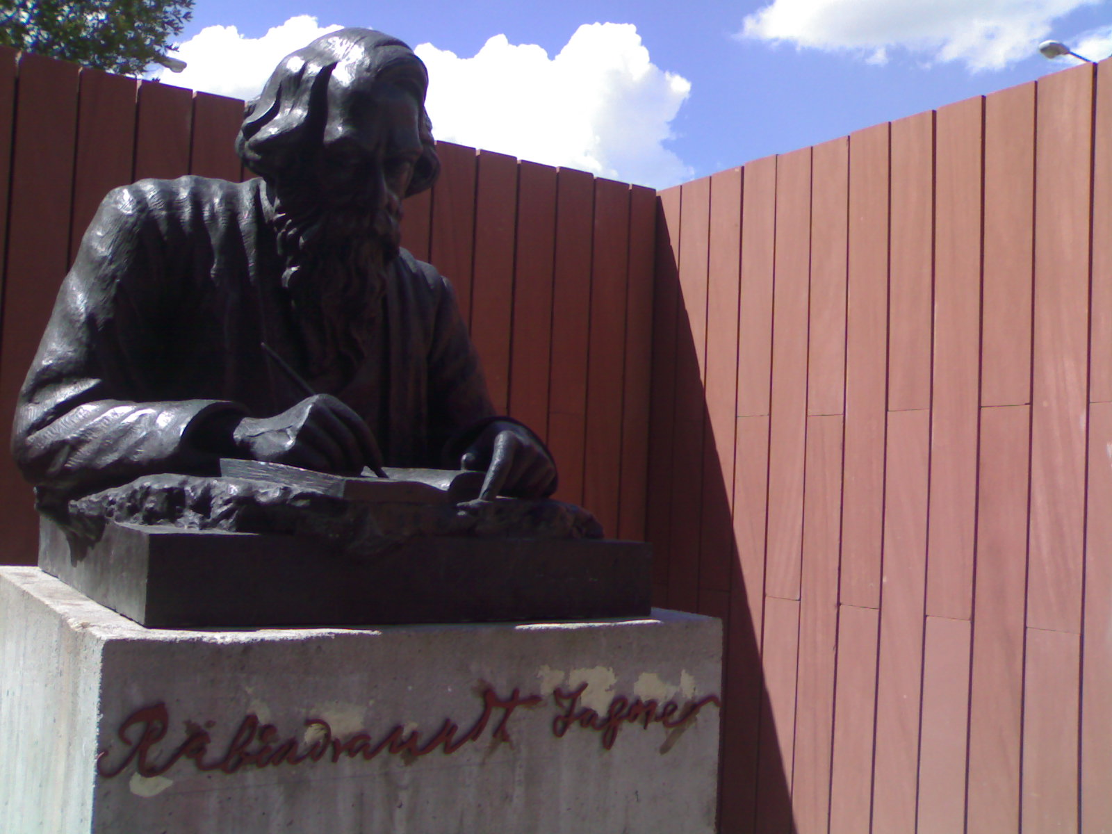 Tagore in Valladolid